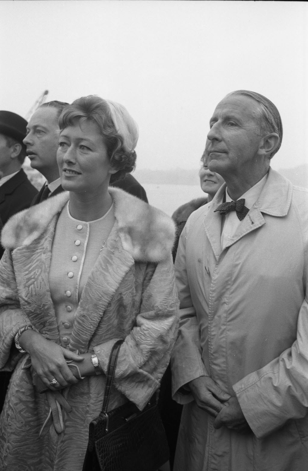 Stapellauf im Werk Dietrichsdorf der Howaldtswerke. Im Bild u.a. Reeder Naess (1.v.r.) und Marie Luise Westphal (2.v.r.).